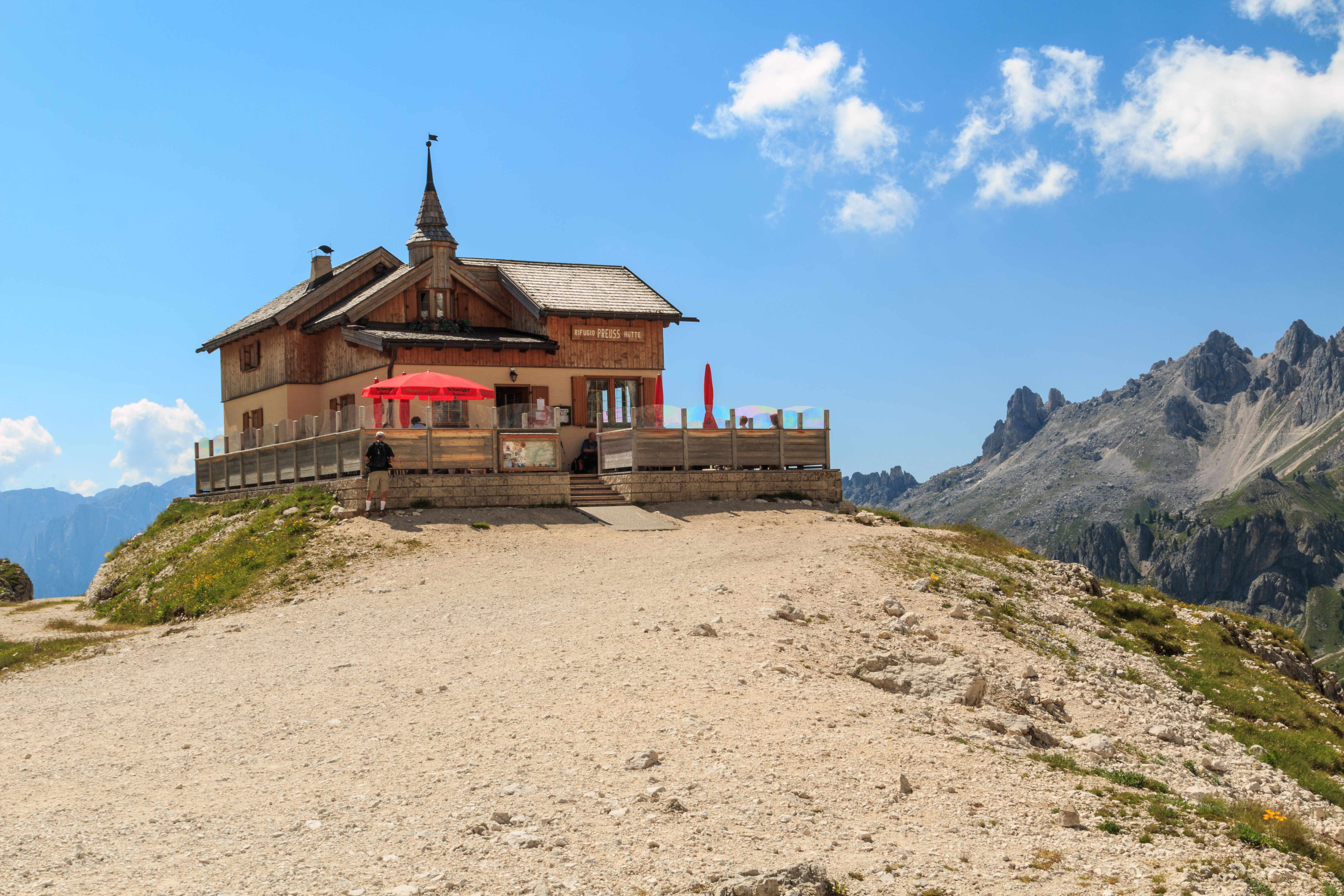 rifugio Preuss in July 2015